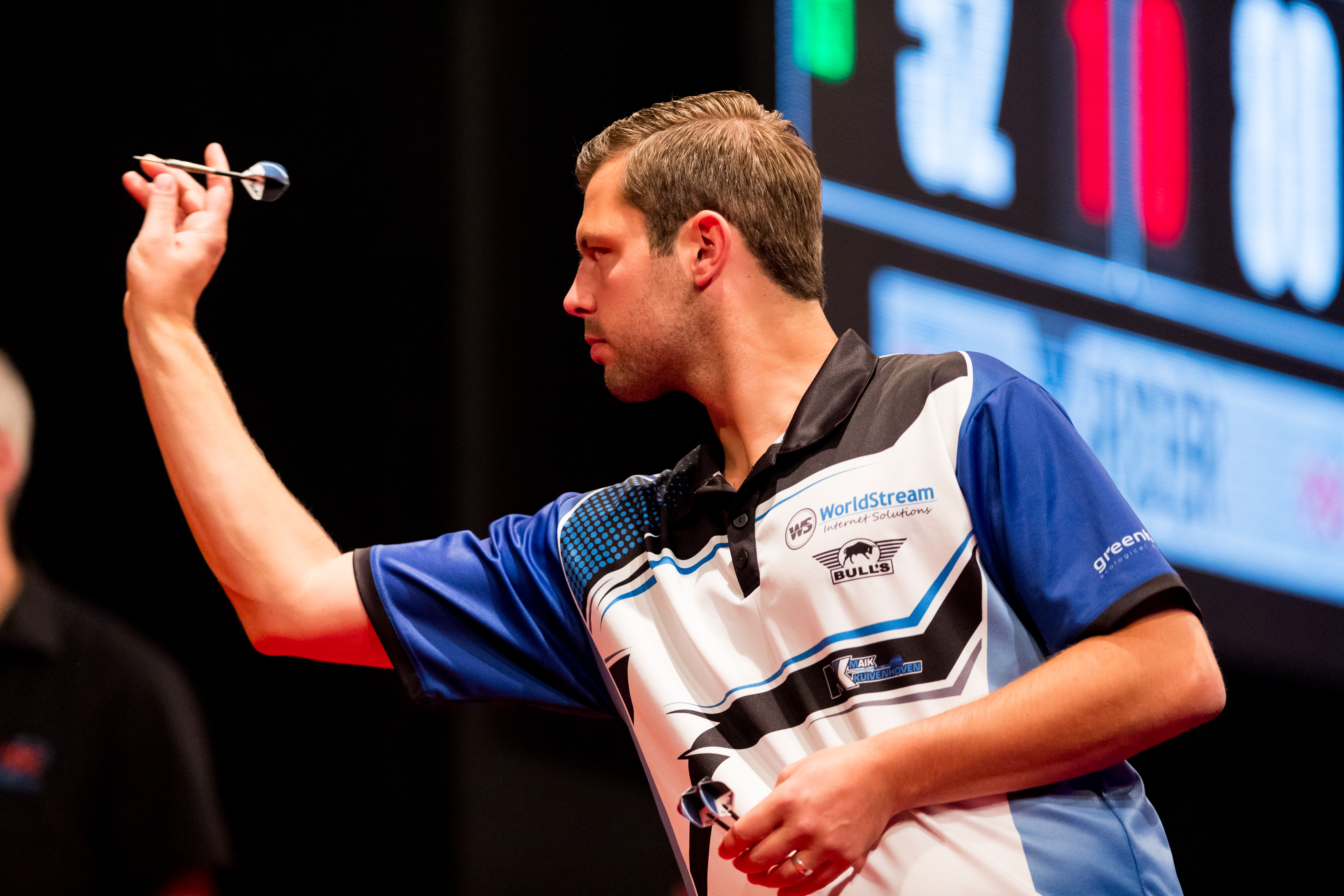 Maik Kuivenhoven 3:6 Karsten Koch during PDC Europe Darts Matchplay at Maimarkthalle, Mannheim, Baden-Württemberg, Germany on 2019-09-06, Photo: Sven Mandel